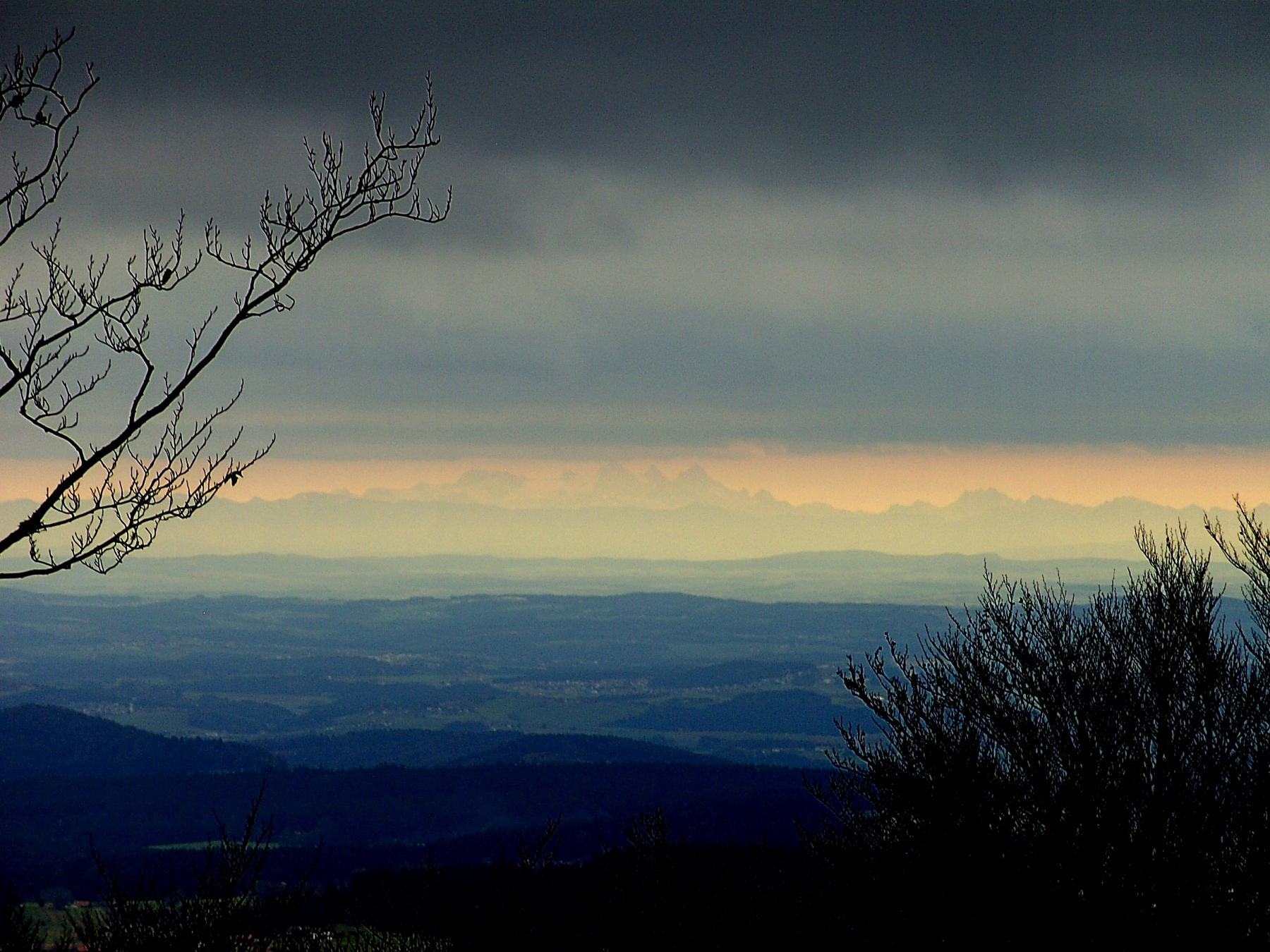 Die Alpen bei großräumiger Föhnwetterlage im Alpenvorland vom Lusen (im Bayerischen Wald) aus gesehen. Der höchste sichtbare Berg ist der Dachstein in etwa 163 km Entfernung.